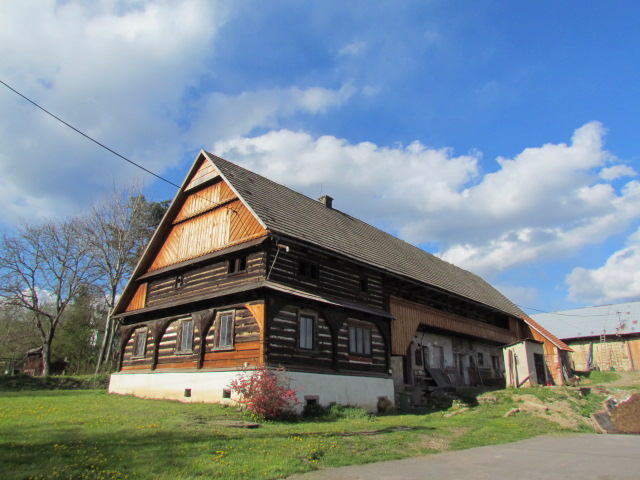 Jediný zachovaný památkově chráněný statek v Soběslavicích